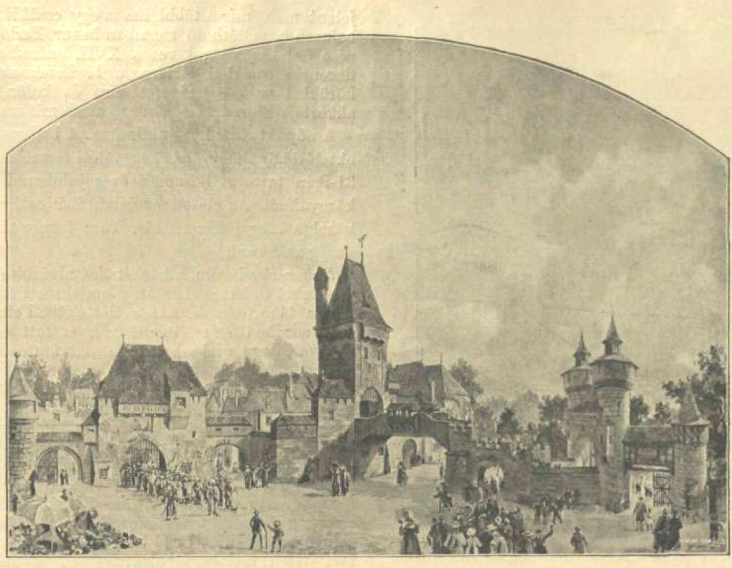 Ősbudavár bejárat